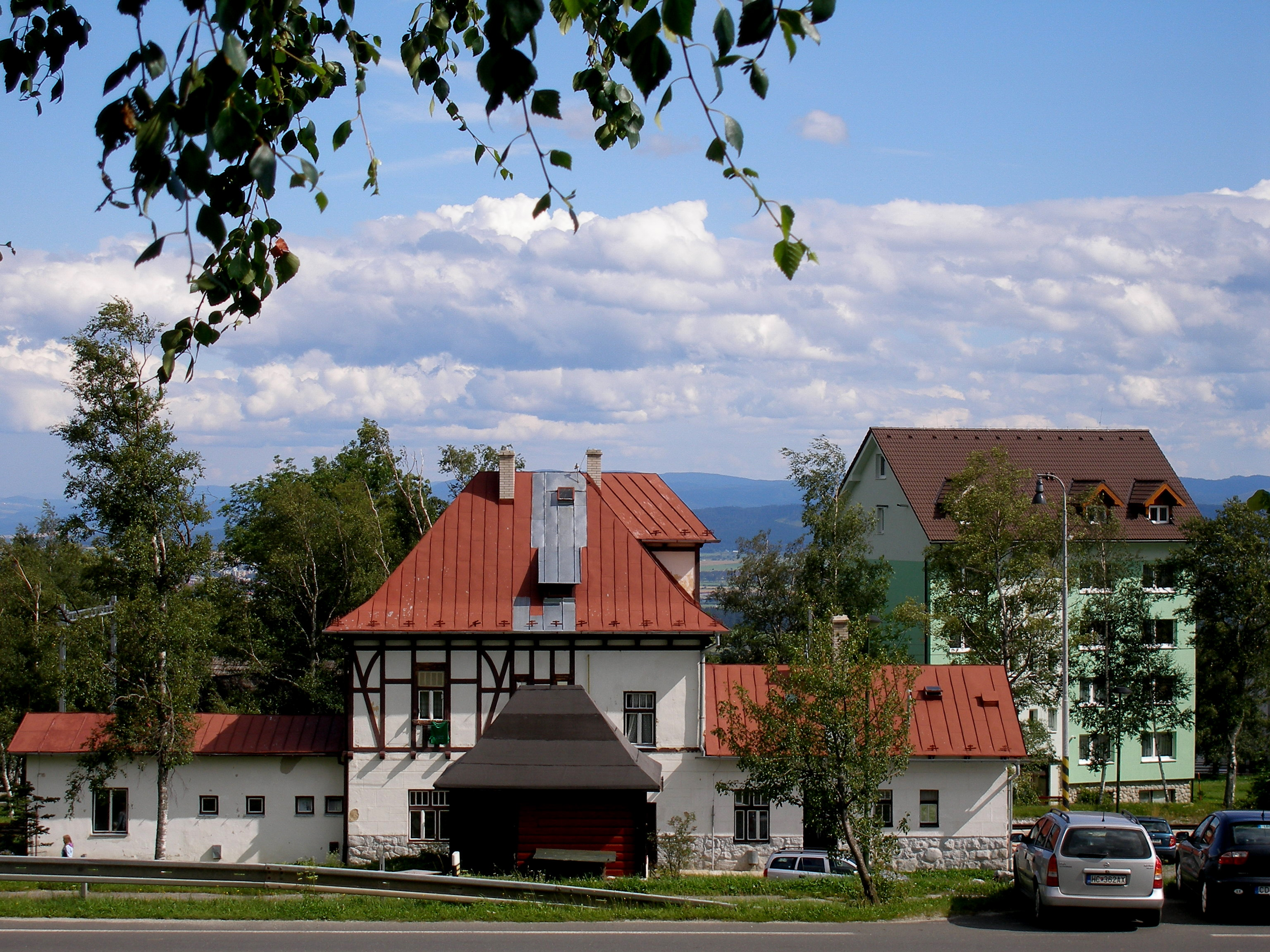 Tatranská osada Tatranská Polianka mesto Vysoké Tatry.